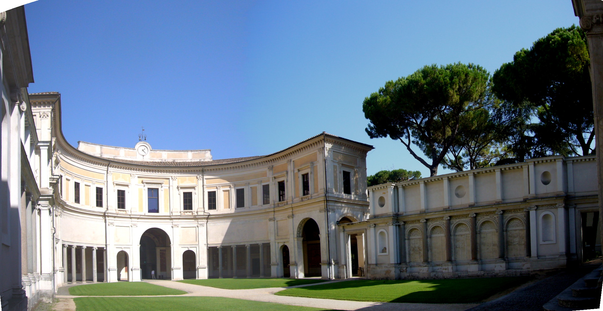 Roma, Villa Giulia: la corte